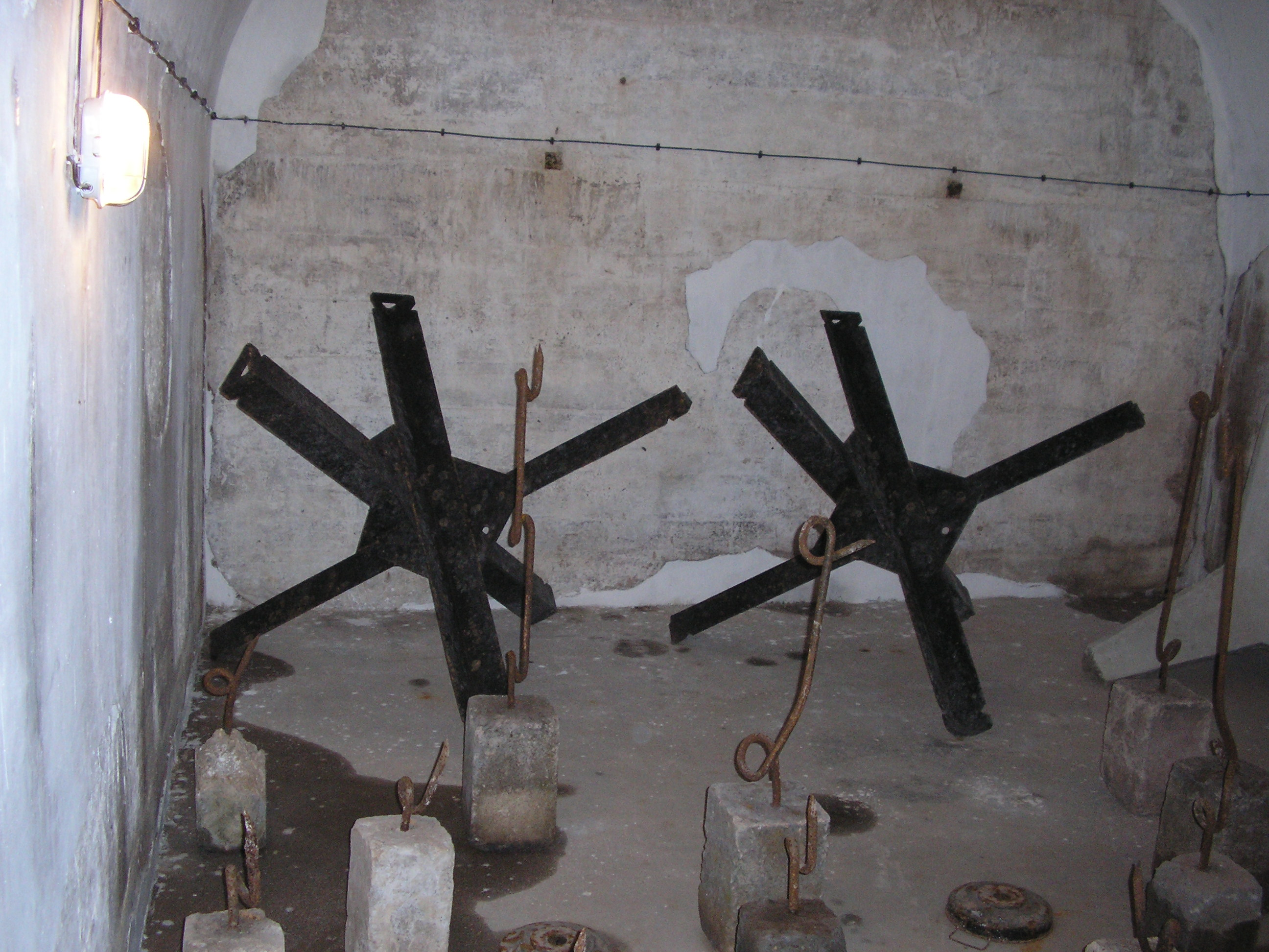 Czech hedgehog